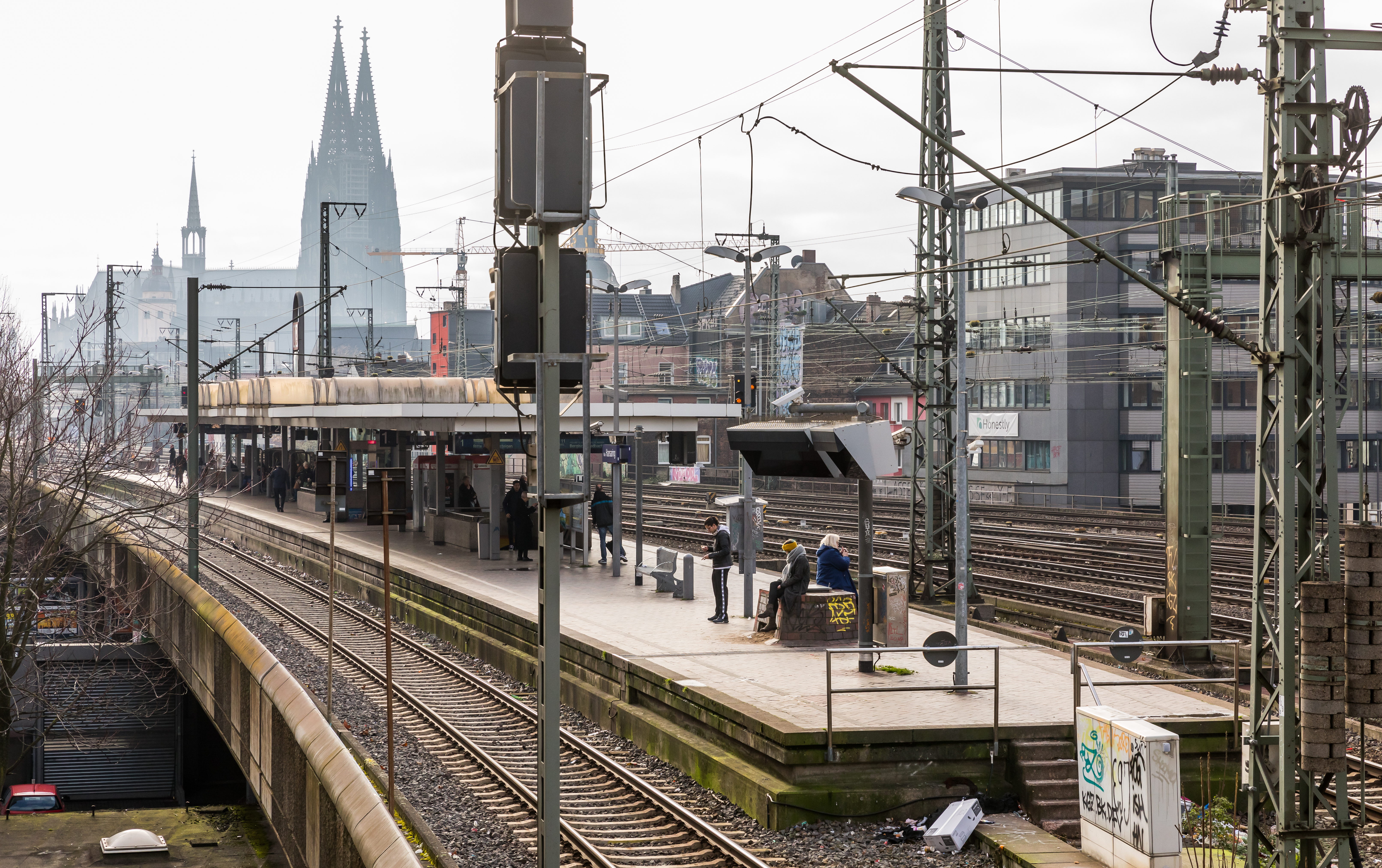 Haltepunkt Köln Hansaring, im Hintergrund der Kölner Dom